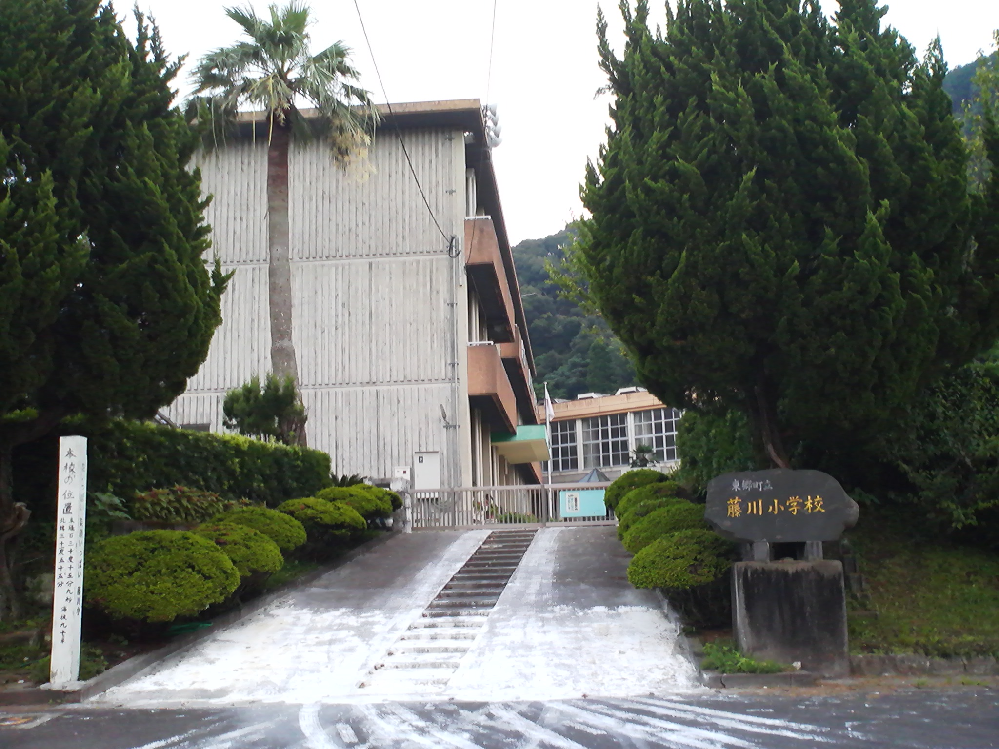 薩摩川内市立藤川小学校の外観。